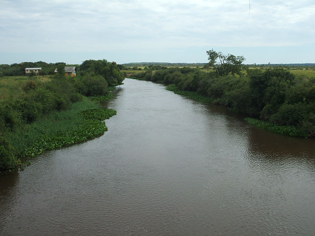 Arroyos y Esteros